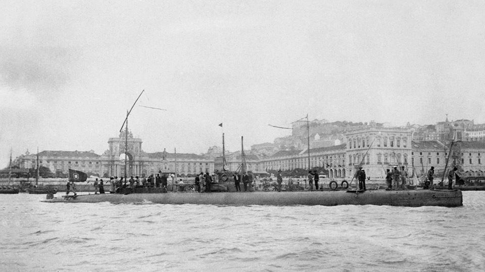 NRP Espadarte em Lisboa.